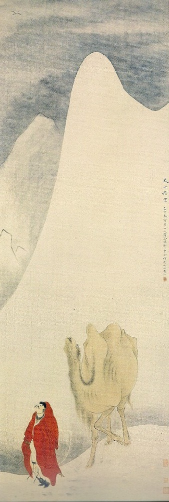 Neige sur le Mont Tian, rouleau mural, encre et couleur claire sur papier, 1755. 159,1x52,8cm. Beijing (Musée du palais impérial) par le peintre chinois Hua Yan (1682-1765).